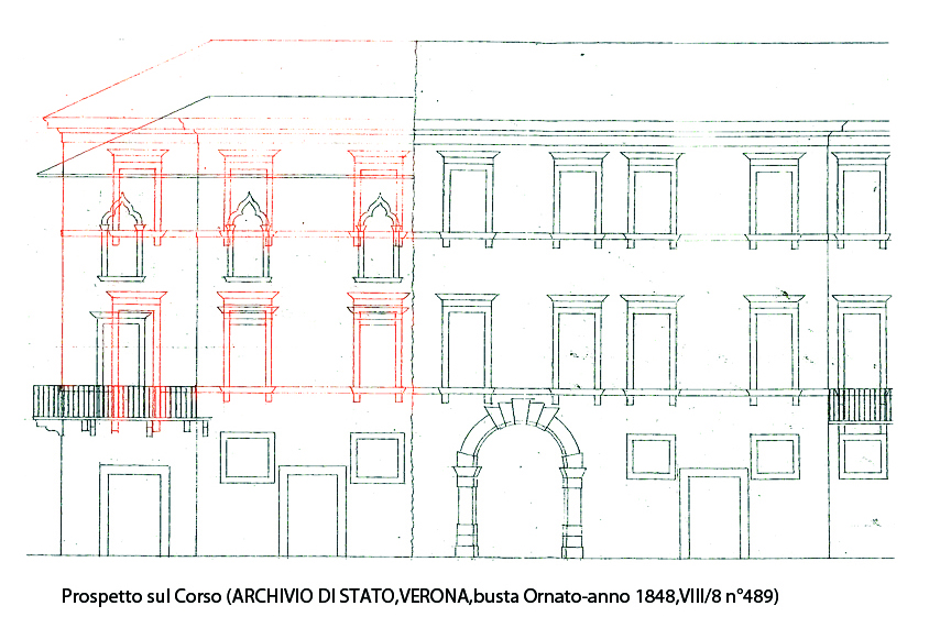 Prospetto su Corso Santa Anastasia di Palazzo Bevilacqua, progetto dell'arch. Francesco Ronzani( in ROSSO il progetto di ristrutturazione dell'edificio del XIII sec.)